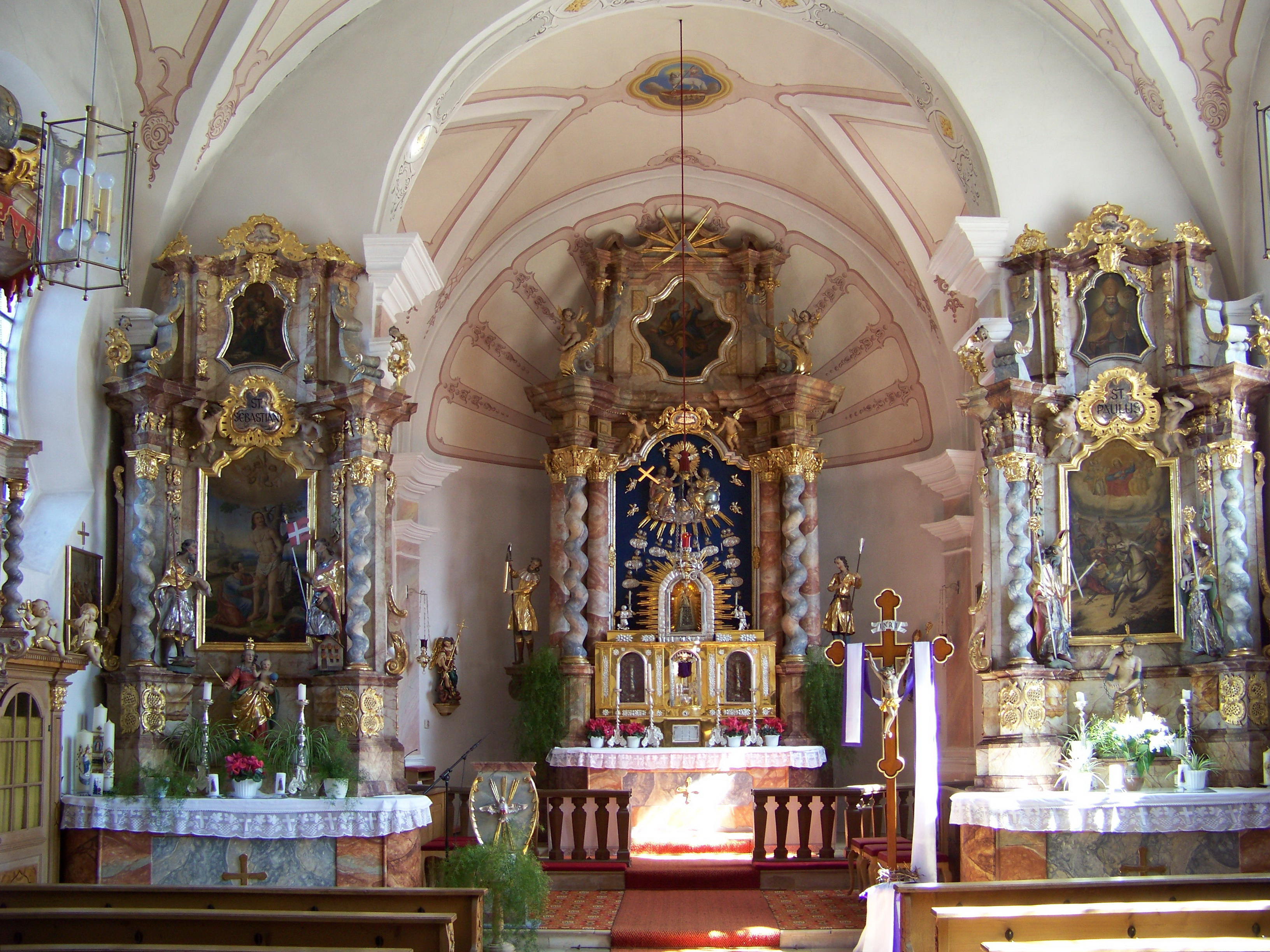 Laberweinting, Haader 20. Katholische Filialkirche St. Pauli Bekehrung. Saalkirche, erbaut 1750, südwestlich Turm mit Spitzhelm, das Turmuntergeschoss spätgotisch, Oberteil um 1854, an der Ost- Süd- und Westseite gedeckter Umgang, nach 1813; mit Ausstattung. Gleichzeitig ist sie Wallfahrtskirche "Zu unserer lieben Frau von Haader". Innenraum mit 3 Altären.